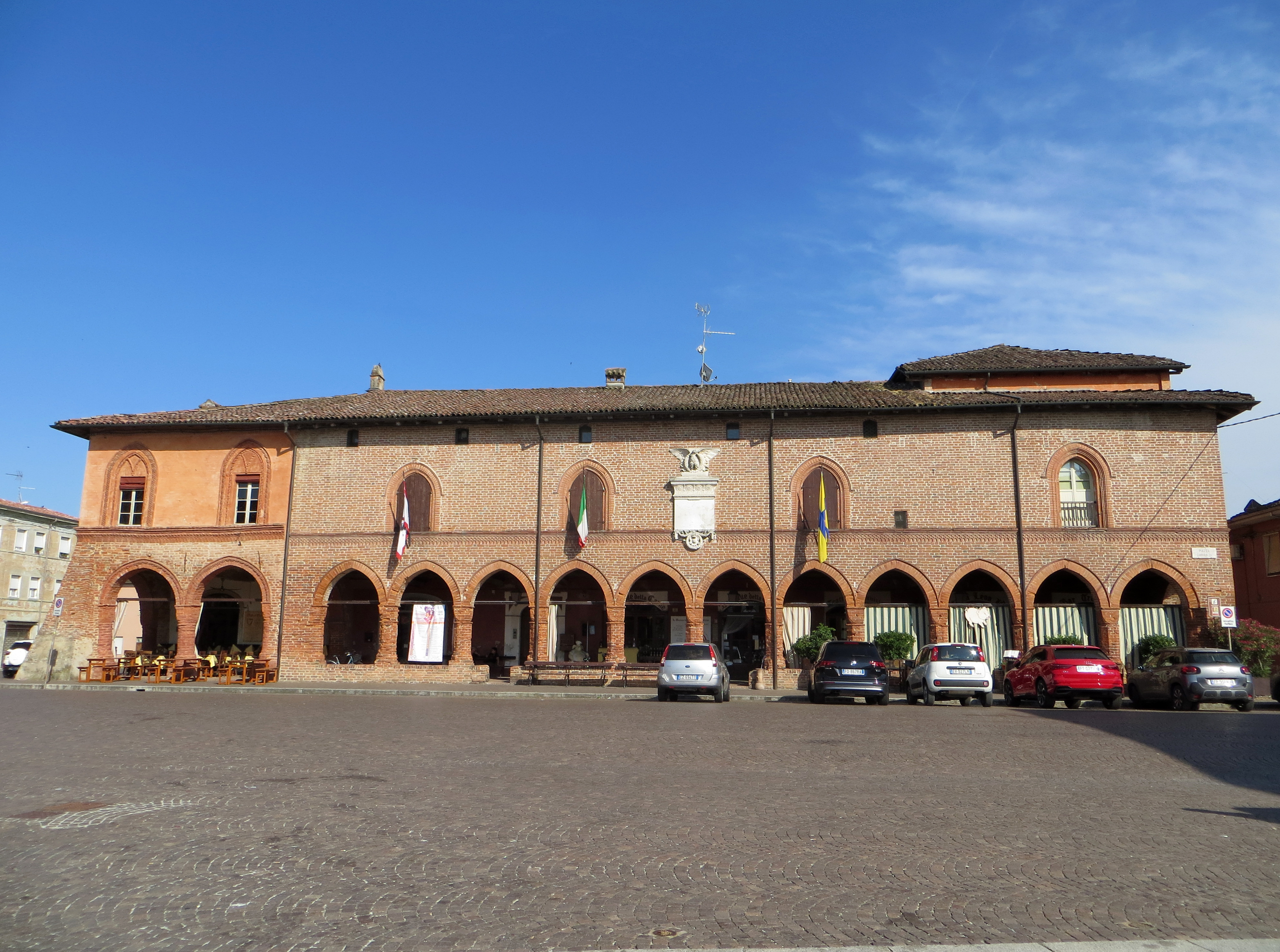 Palazzo Pallavicino (Zibello) - facciata